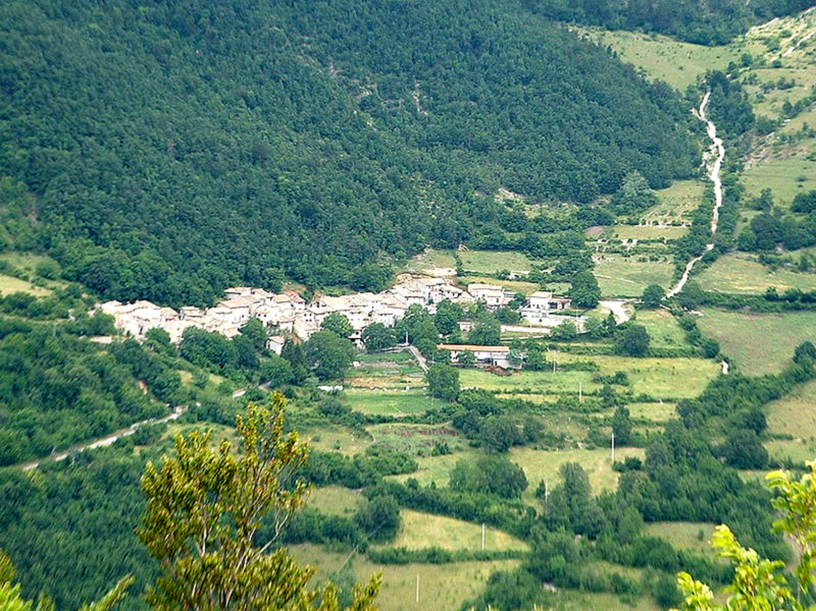 Panorama di Macchie, frazione di Castelsantangelo sul Nera.